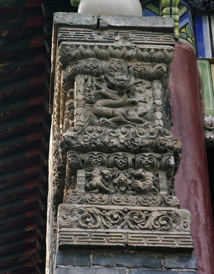 开封北清真寺石雕